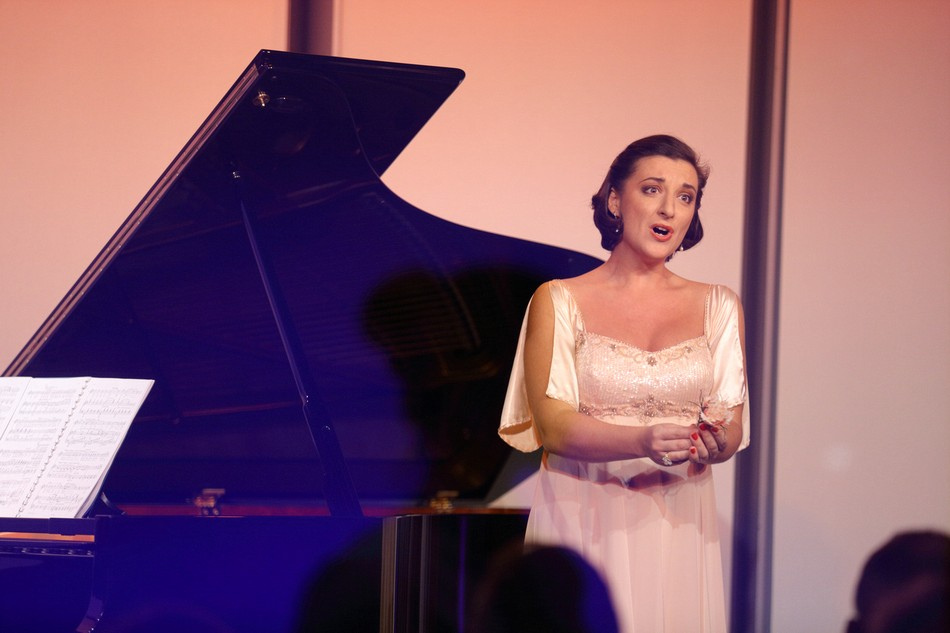 Preisträgerkonzert NEUE STIMMEN 2013 Fotos: Frank Nürnberger